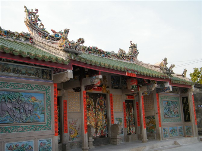 葛朱朱氏祖祠